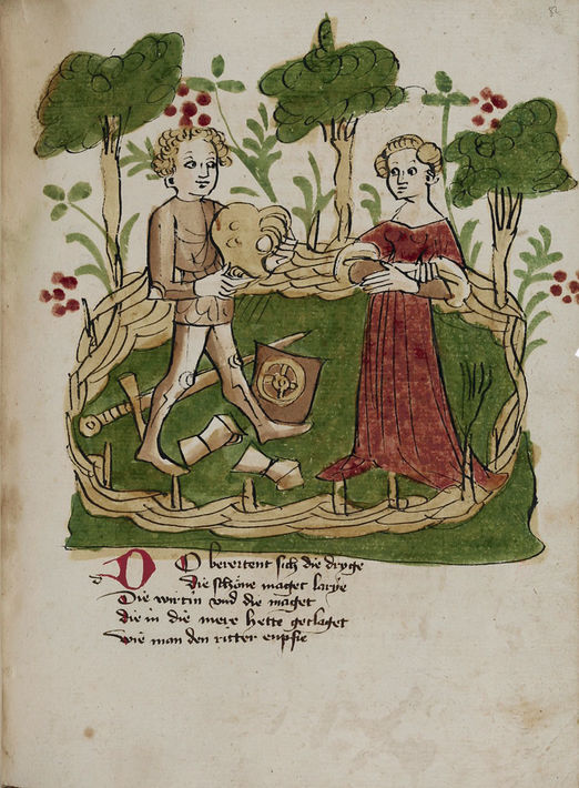 Wirnt von Grafenberg: Wigalois, Handschrift k (Karlsruhe, Badische Landesbibliothek, Cod. Don. 71, fol. 82r) - Wigalois legt im Garten von Roimunt Rüstung und Waffen ab